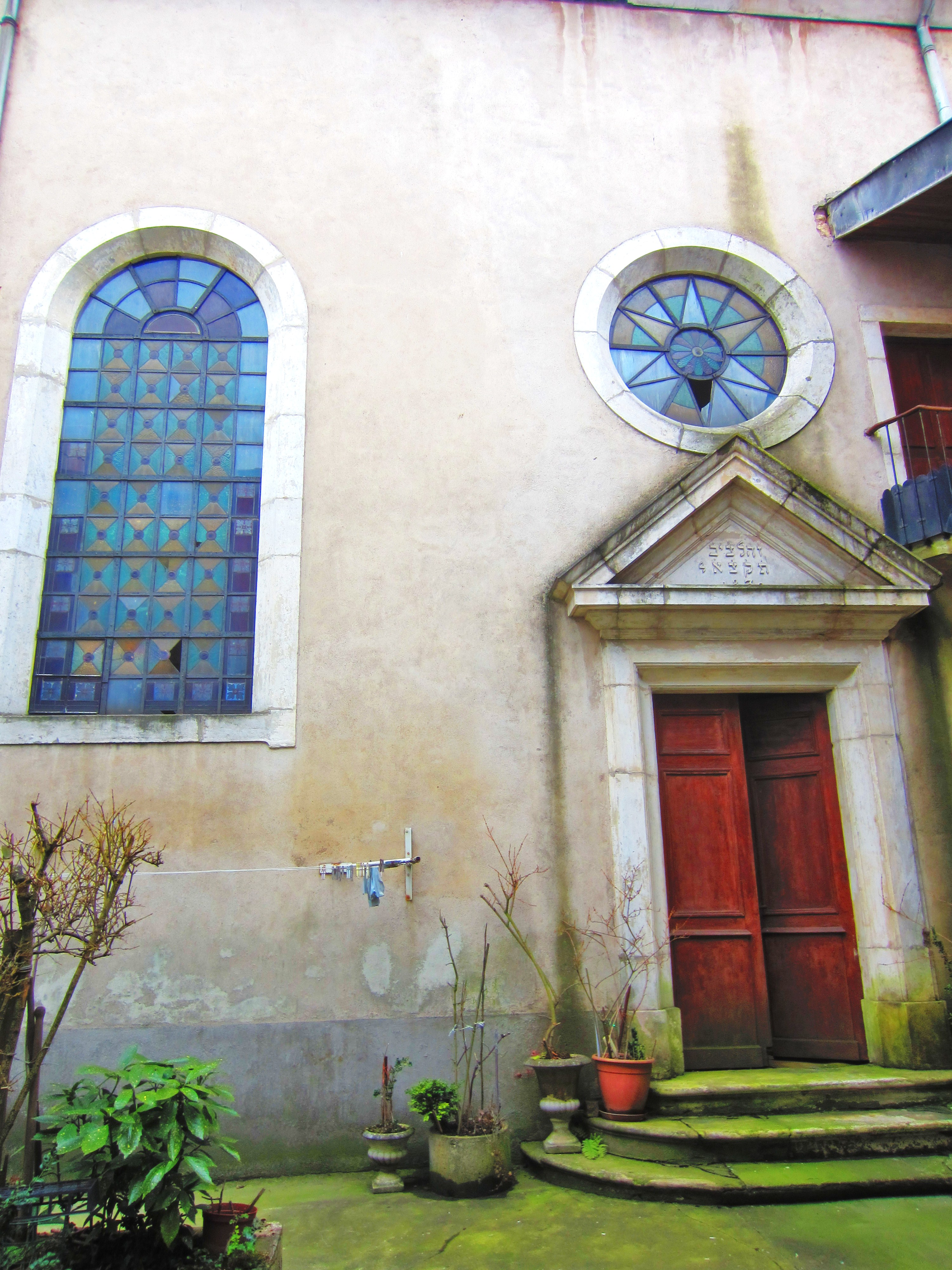 Ancienne synagogue de Pont-à-Mousson. Au fronton, l'inscription hébraïque est le sigle du verset 20 du psaume 118 (זֶה-הַשַּׁעַר לַיהוָה; צַדִּיקִים, יָבֹאוּ בוֹ): "Voici la porte de l’Éternel : C’est par elle qu’entrent les justes", suivi de l'année 1830 en numérations hébraïque et indo-arabe.